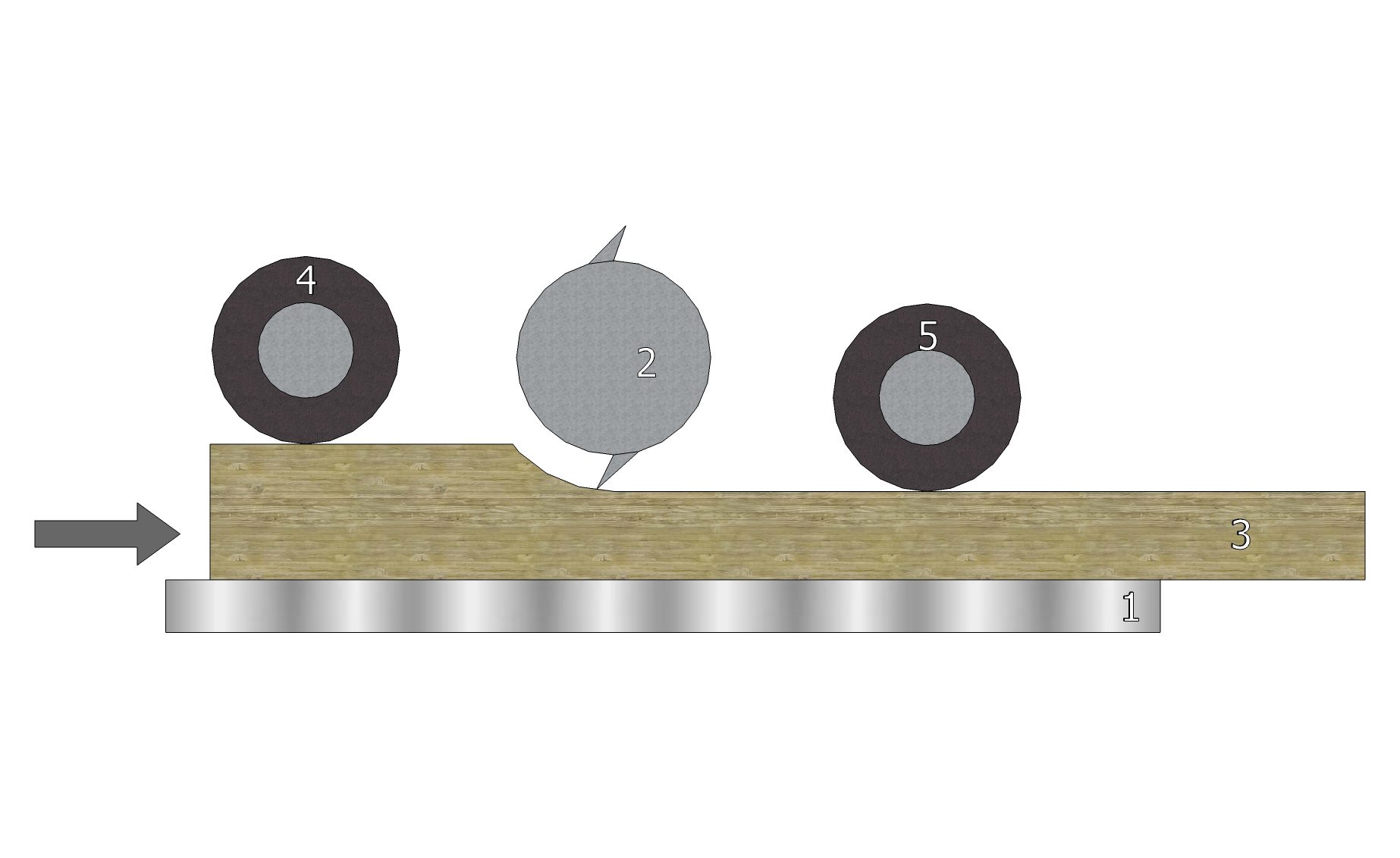 Односторонний рейсмусовый станок